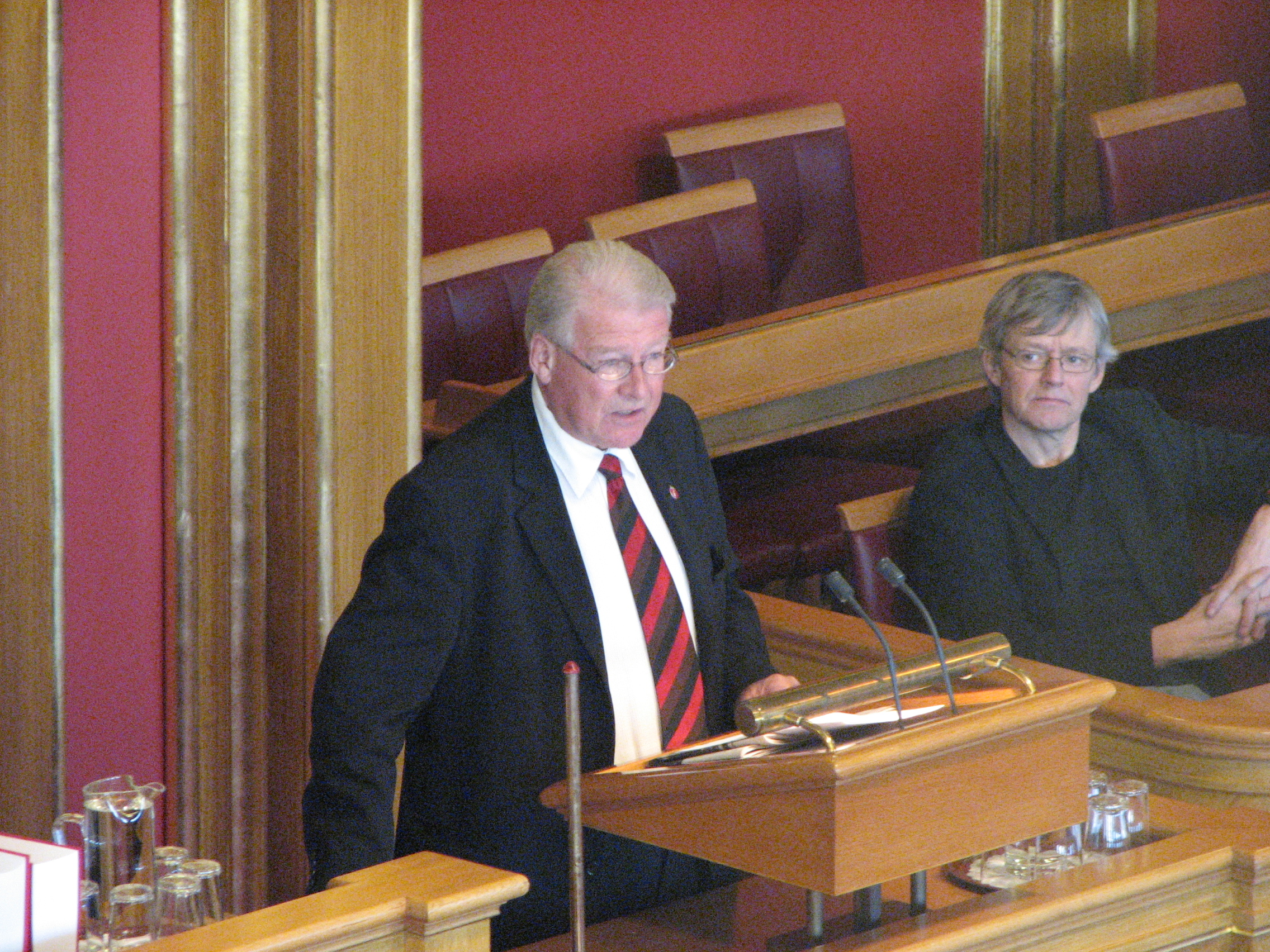 Stortingsrepresentant og stortingets visepresident Carl I. Hagen for Oslo Frp i Stortinget 12. februar 2009.